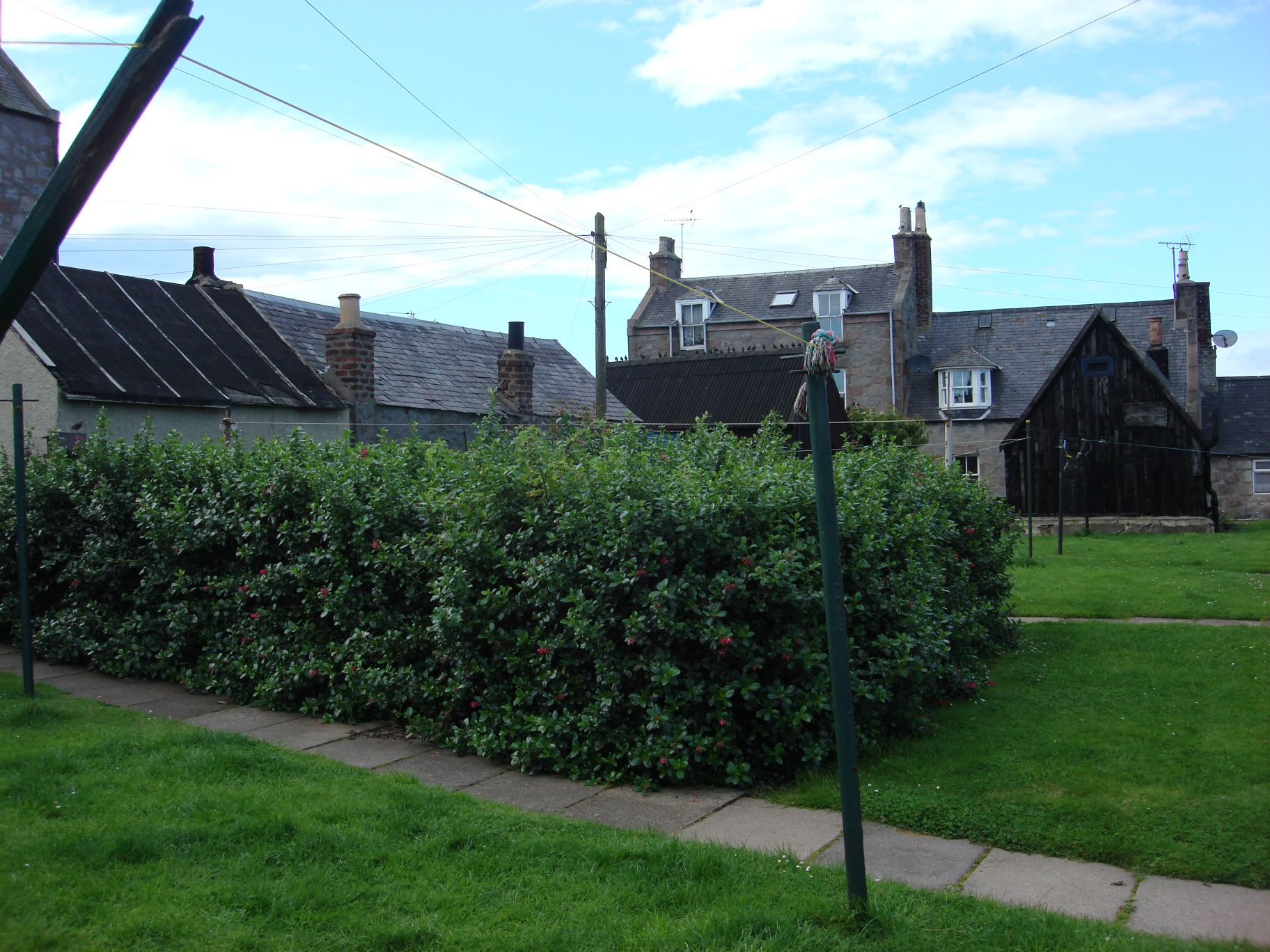 Houses and Gardens in Footdee, Aberdeen, Scotland